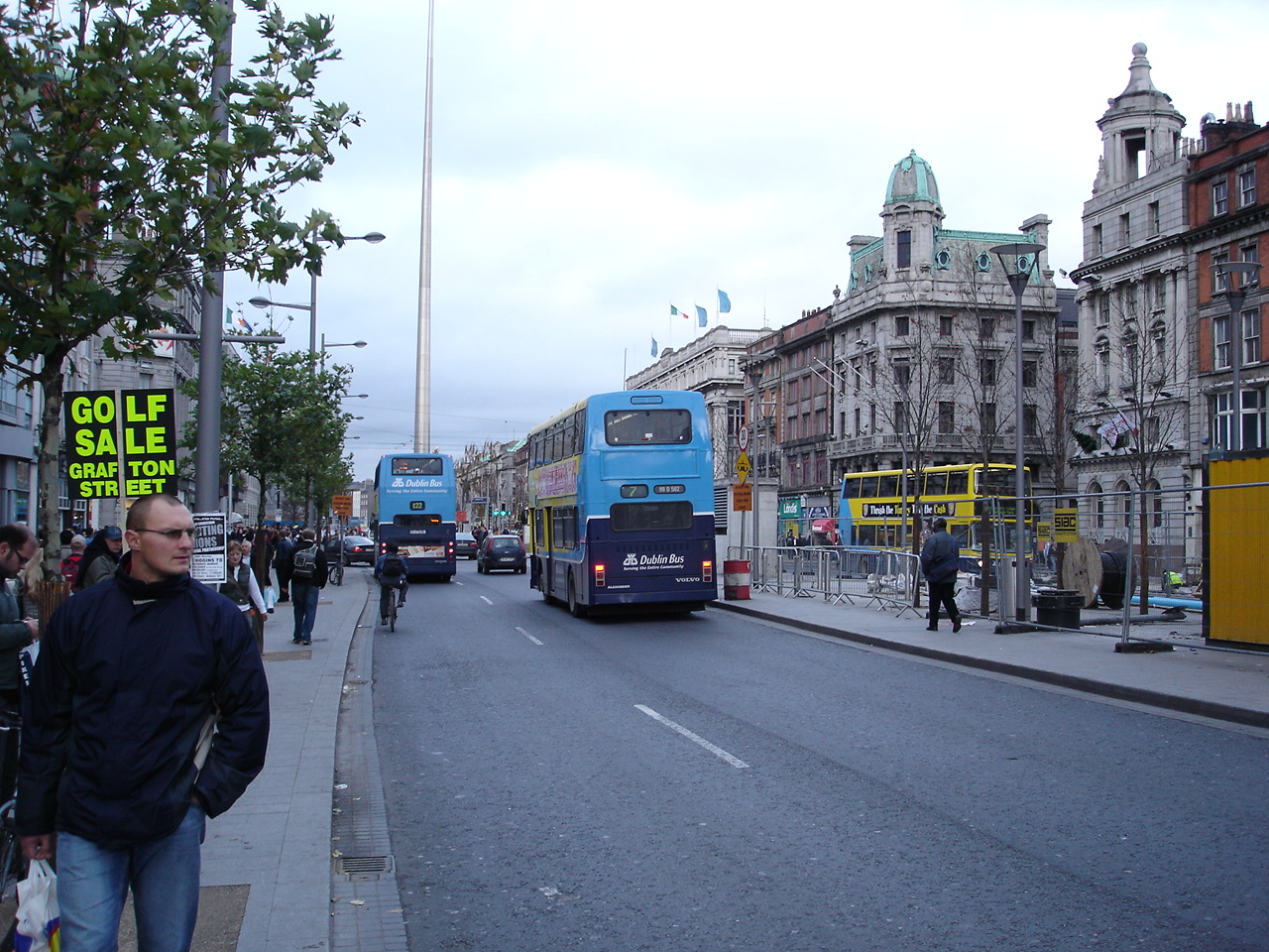 O' Connel Street, Dublin. Foto: Ferale, desember 2005